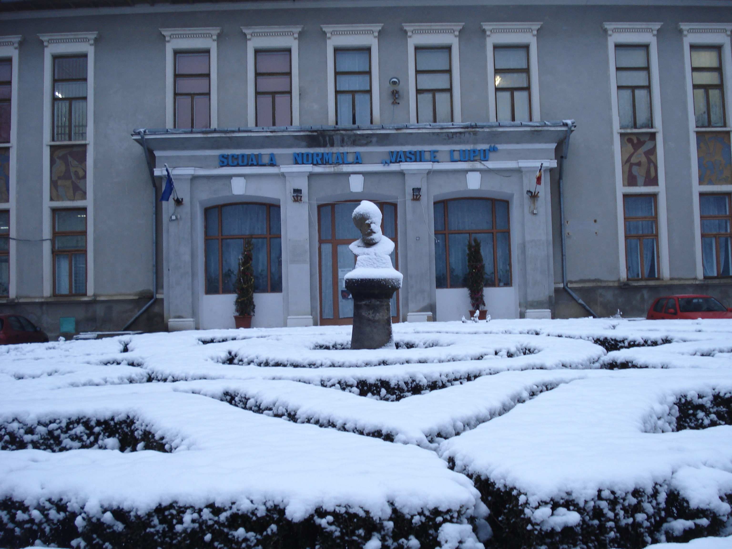 Bustul lui Vasile Lupu